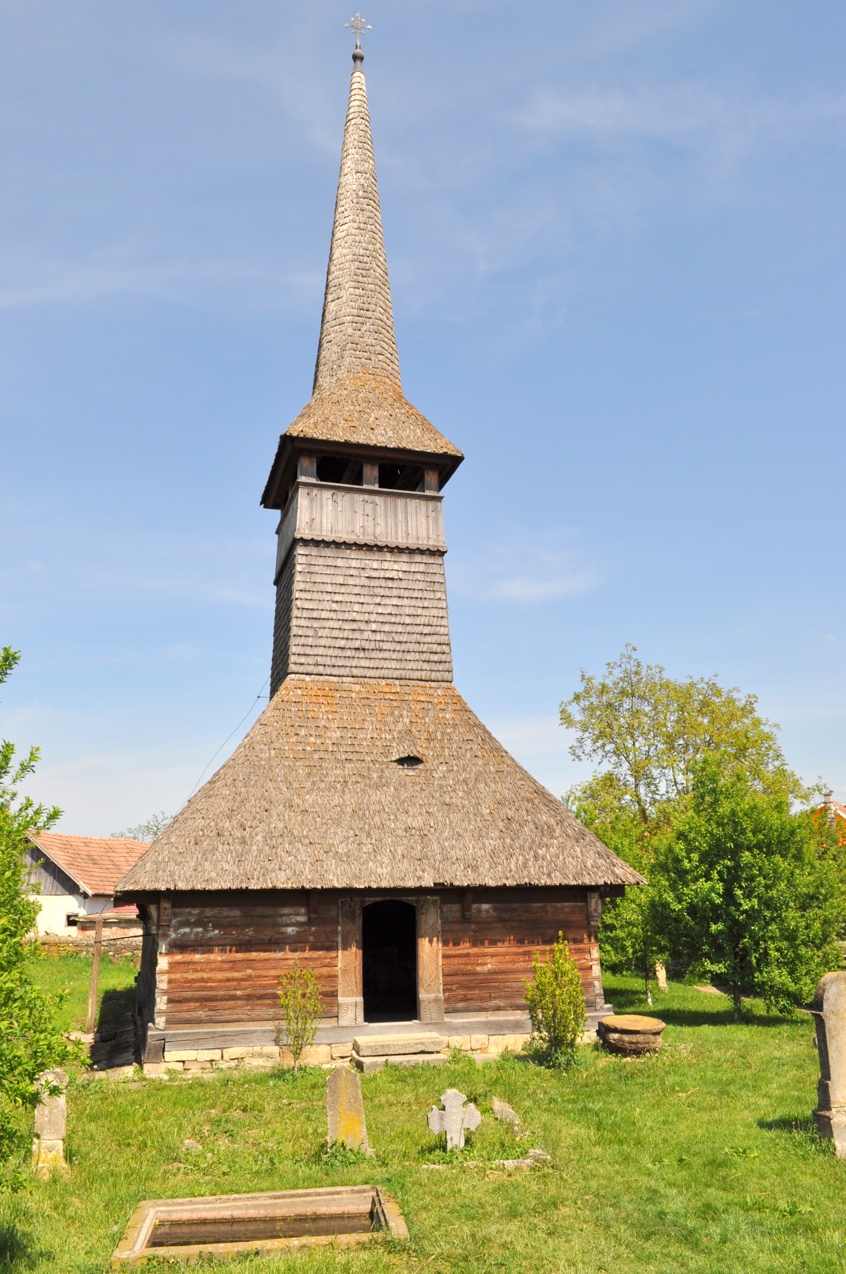 Biserica de lemn din Apahida, județul Cluj